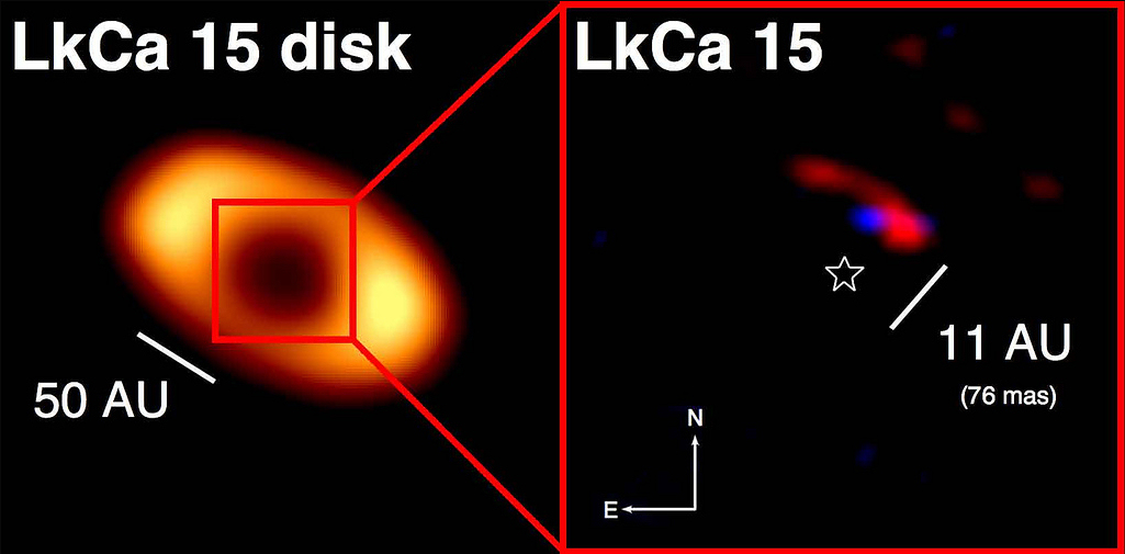 The transitional disk around the star LkCa 15, das innere staubfreie Loch hat als Durchmesser des 55fachen Abstand von Erde - Sonne